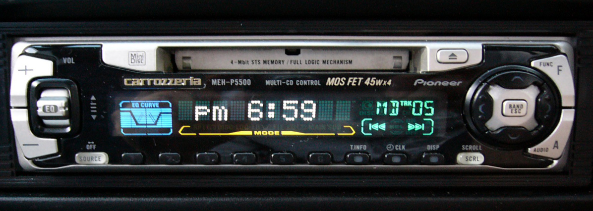 私の過去に所有していた車とステレオです。